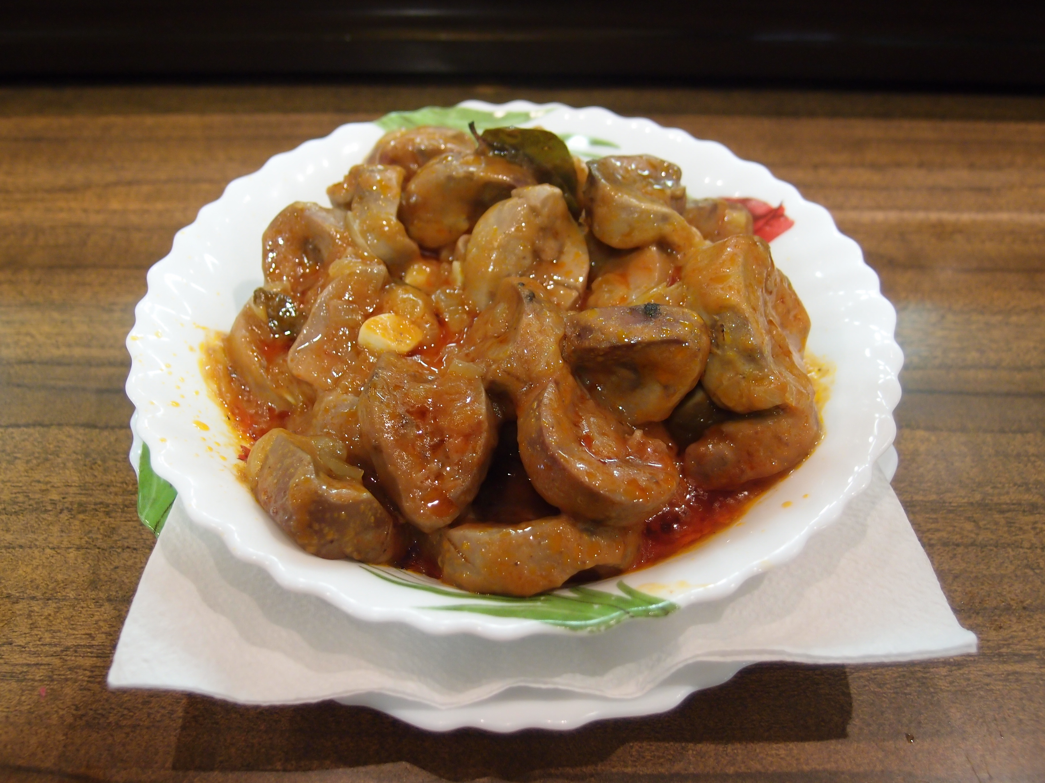 Riñones en salsa (Kalbsnierchen in Sauce) Datum: 05.09.2014 Urheber: M. Pfeiffer alias Gordito1869 Quelle: privates Fotoarchiv des Urhebers